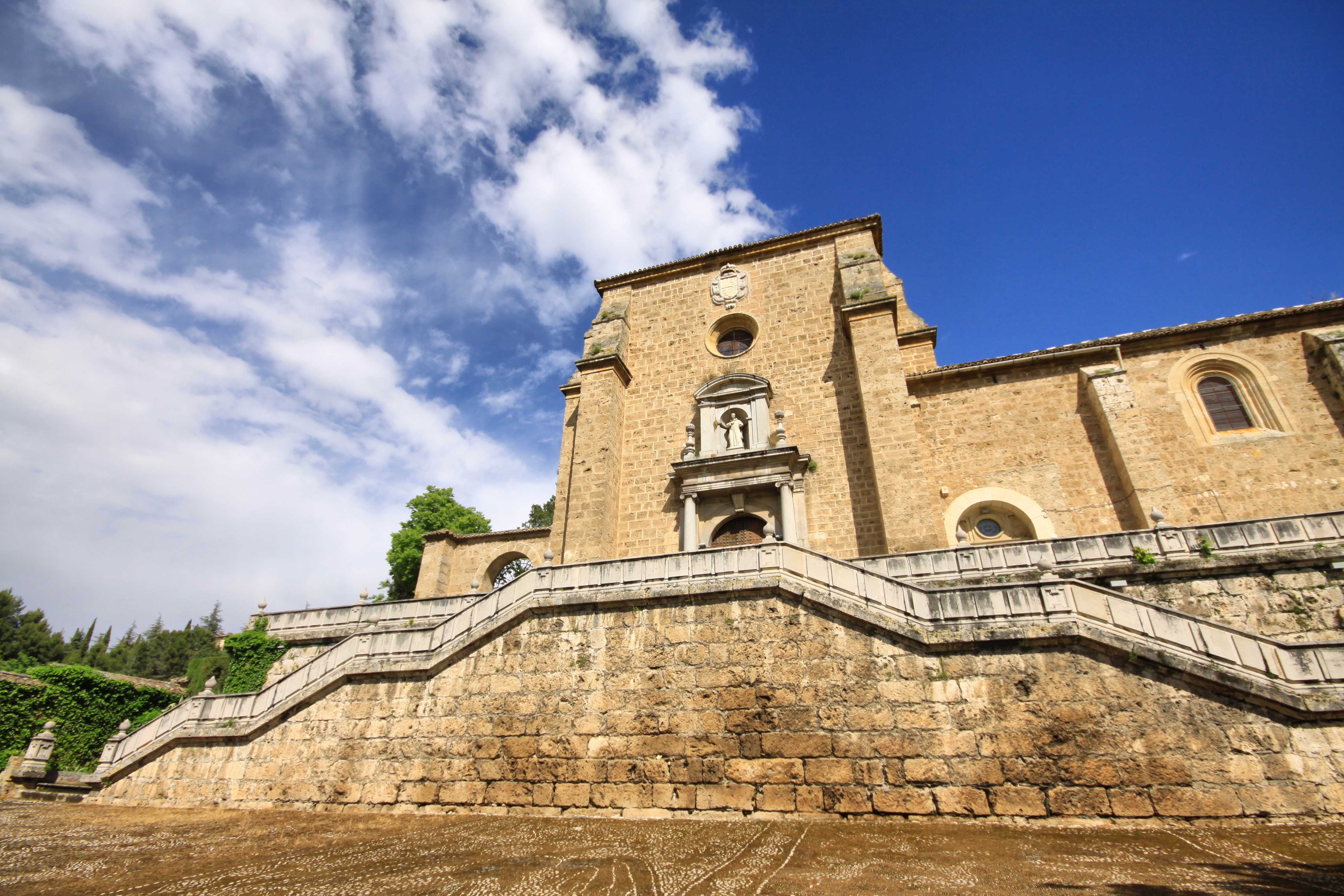 Cartuja de Granada